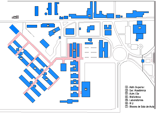 Mapa parcial do Campus do Itaperi da UECE